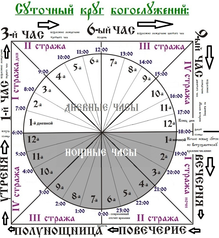 Схема периодического чередования богослужений Православной церкви в течении каждого дня.